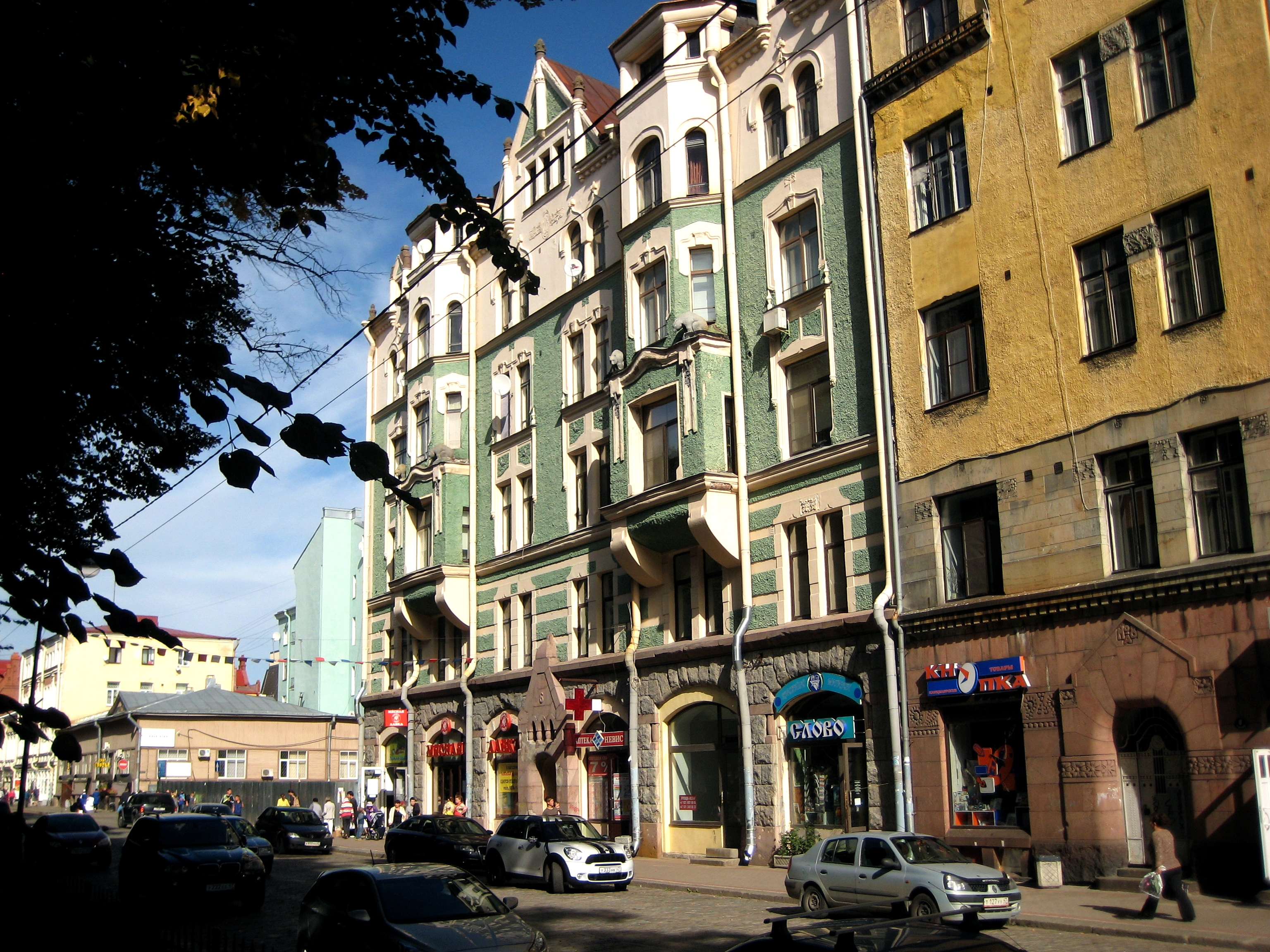 Выборг. Купеческий дом Маркелова (пр.Ленина, 6)